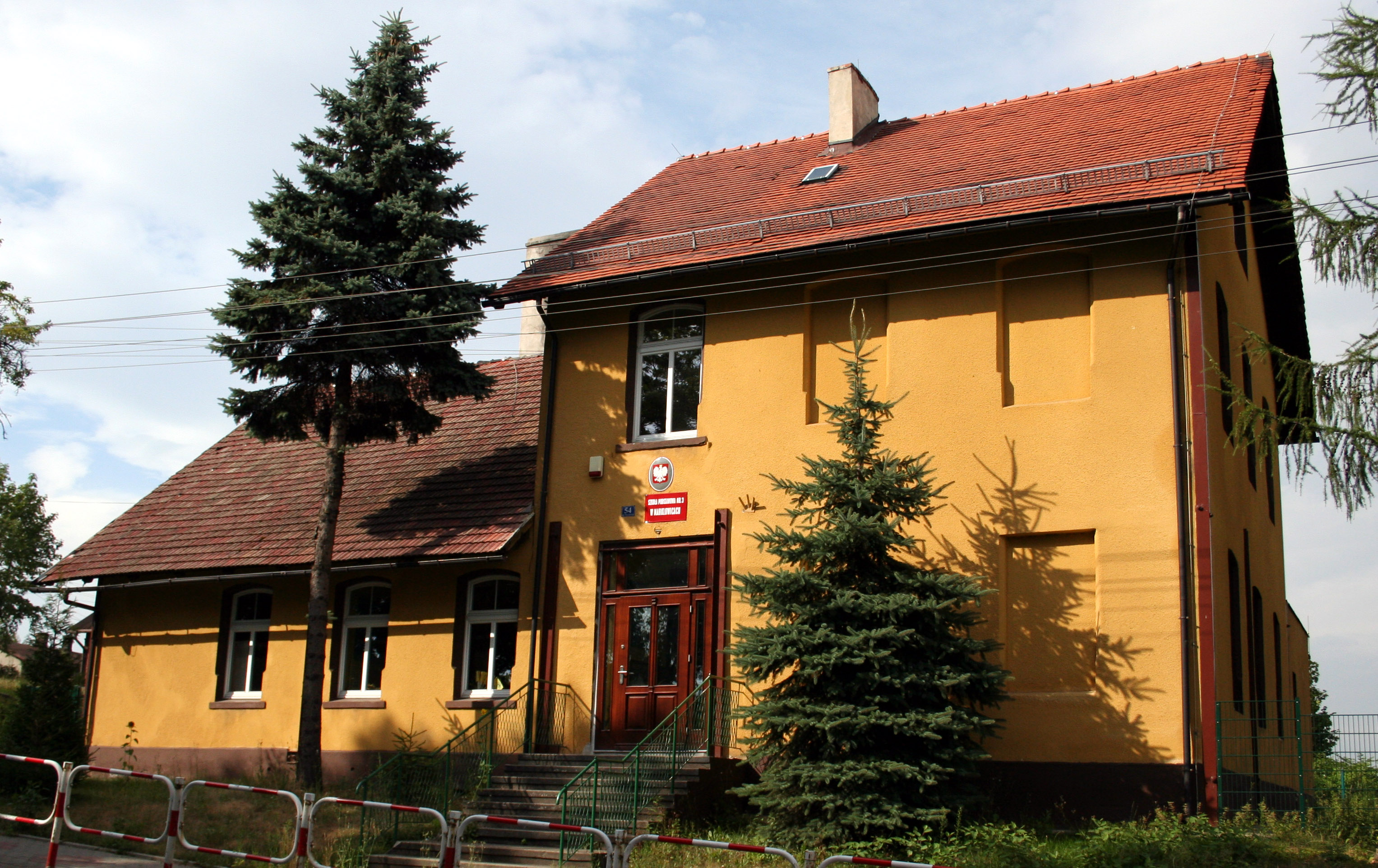 Szkoła podstawowa w Marklowicach Górnych